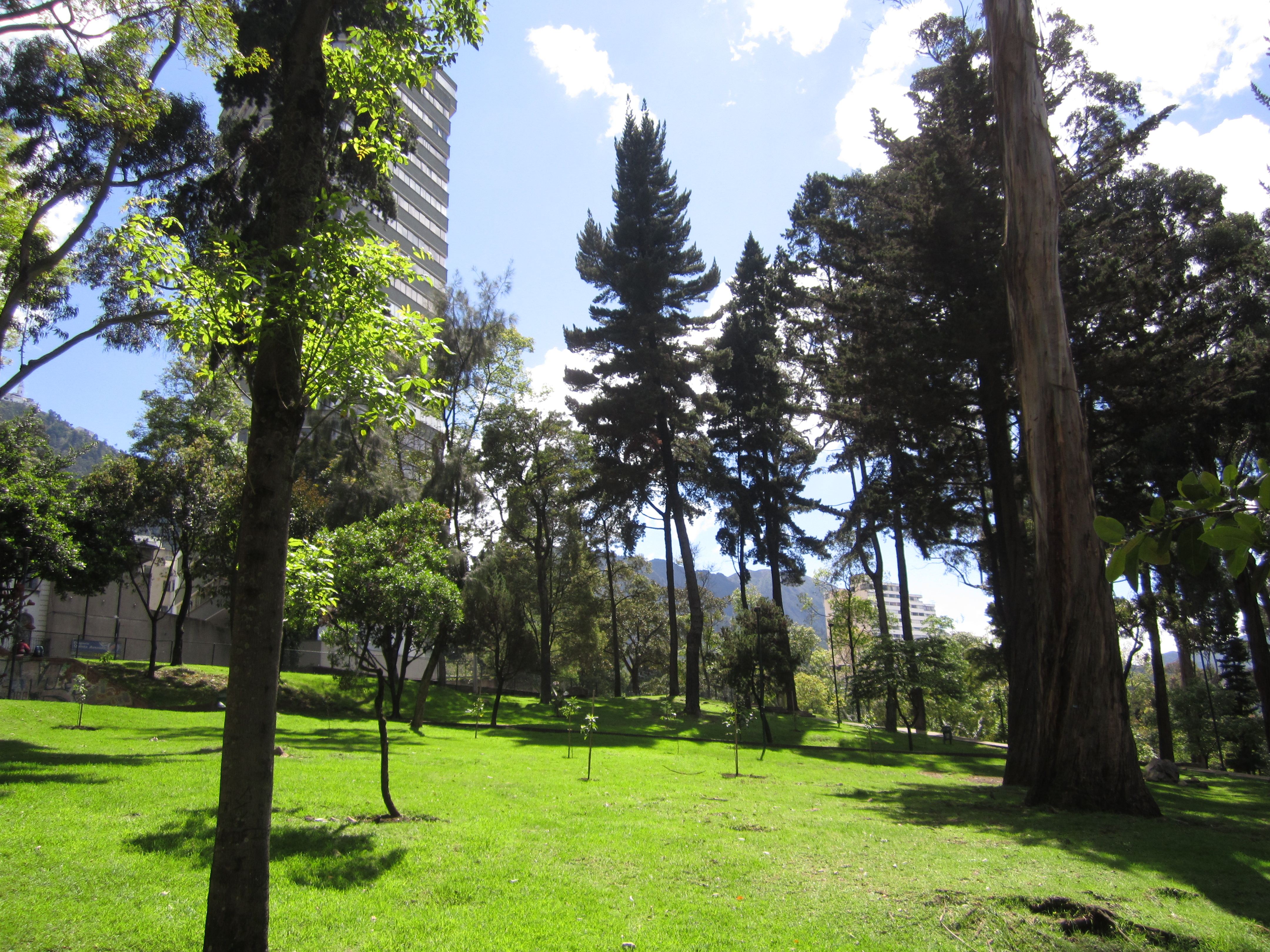 Bogota Parque de la Independencia